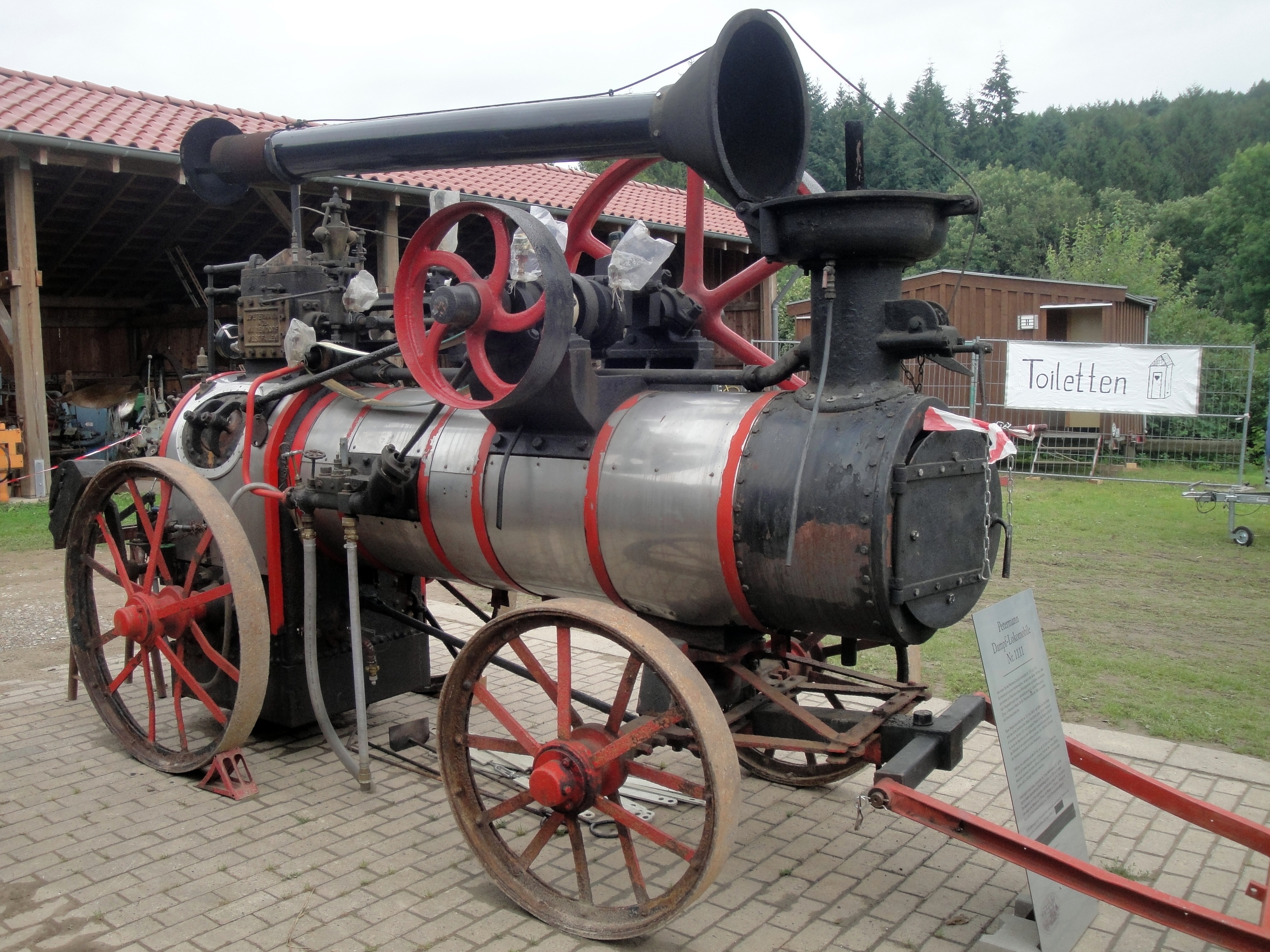 Petermann Dampf-Lokomobile Nr. 1111 von 1911, Traktorentreffen 2016, Traktorenmuseum Melle-Buer/Meesdorf